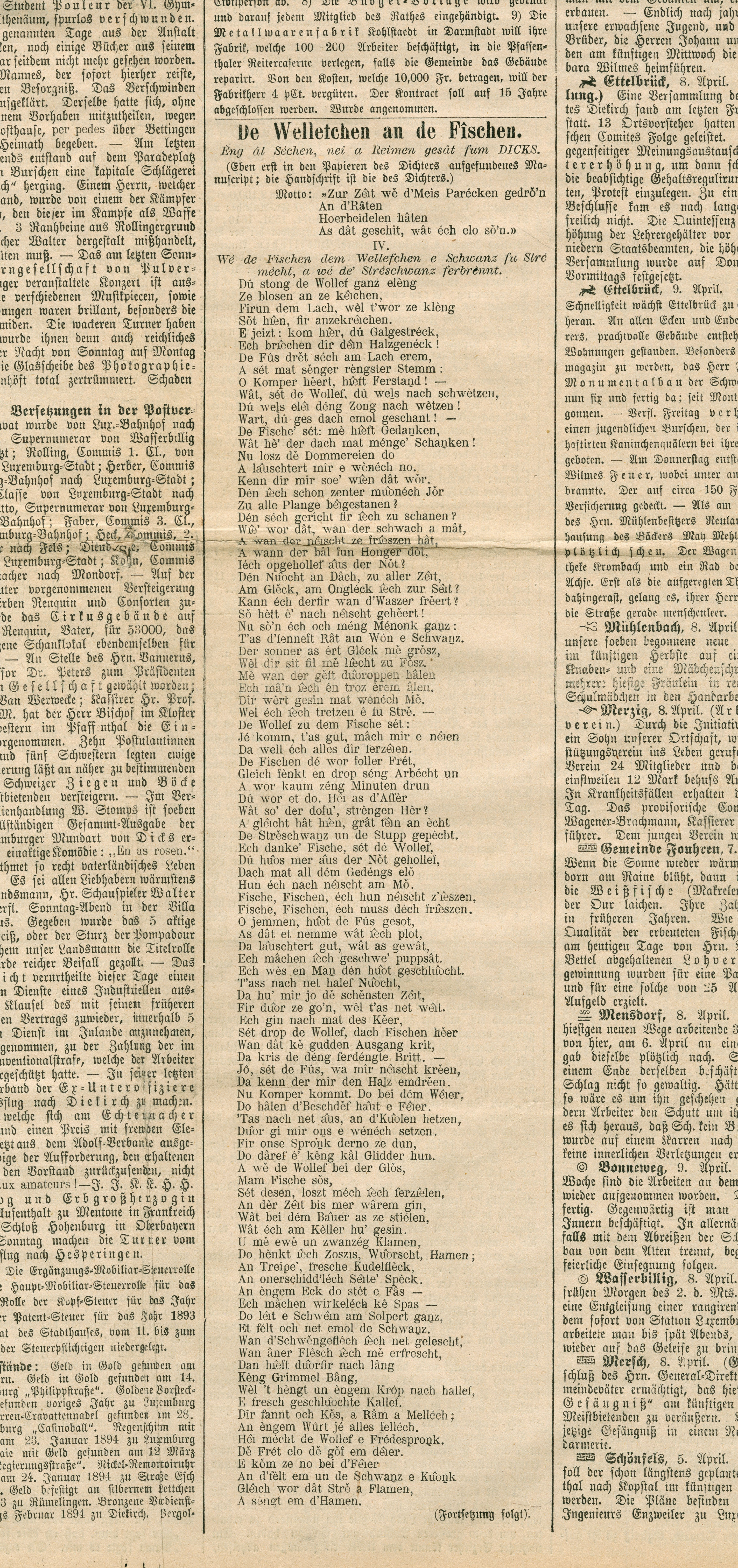 "De Wellefchen an de Fîschen : Êng al Séchen, nei a Reimen gesât" Extrait aus der "Luxemburger Volkszeitung", Abrëll 1894